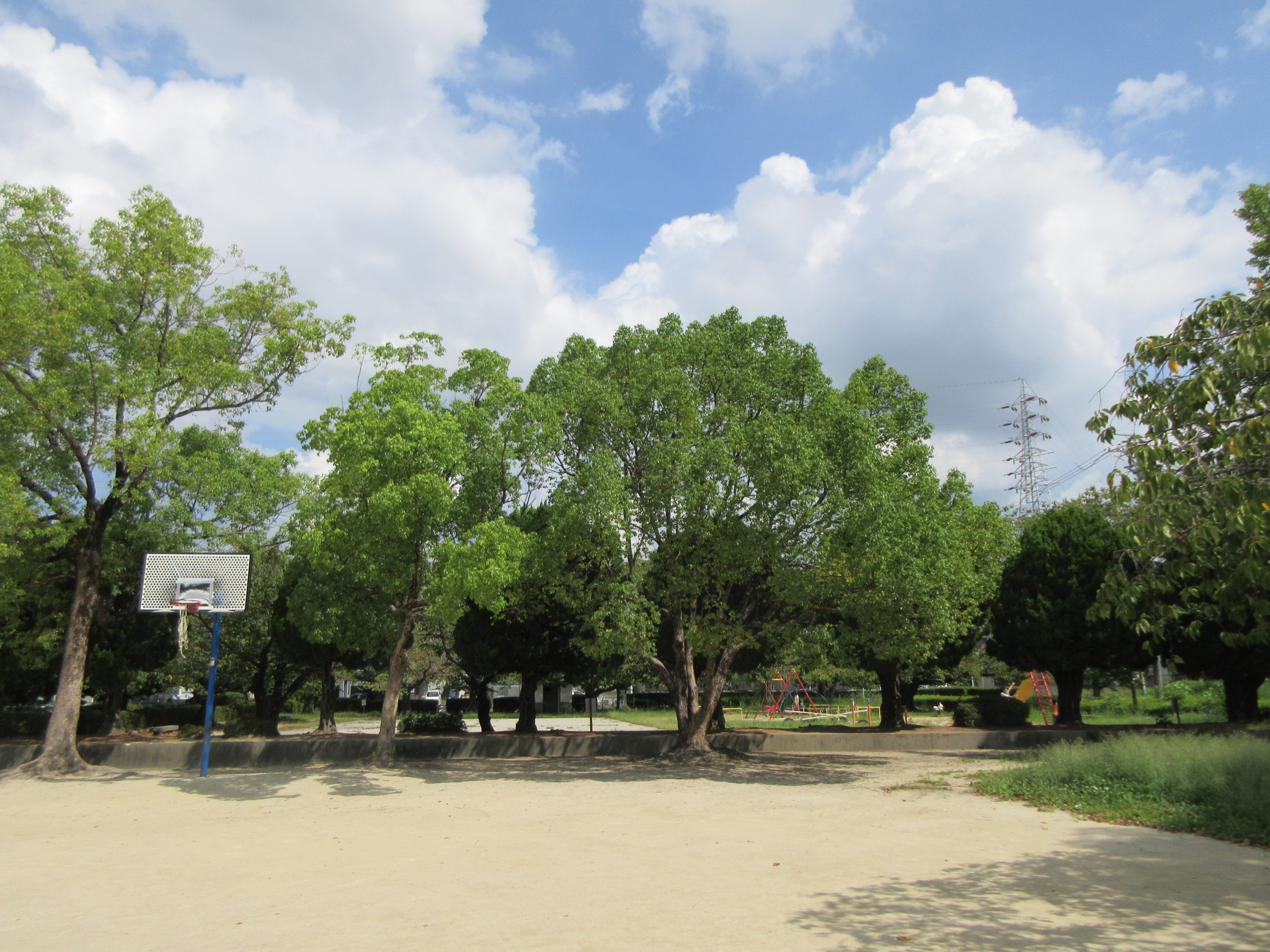 井田公園（岡崎市井田新町）